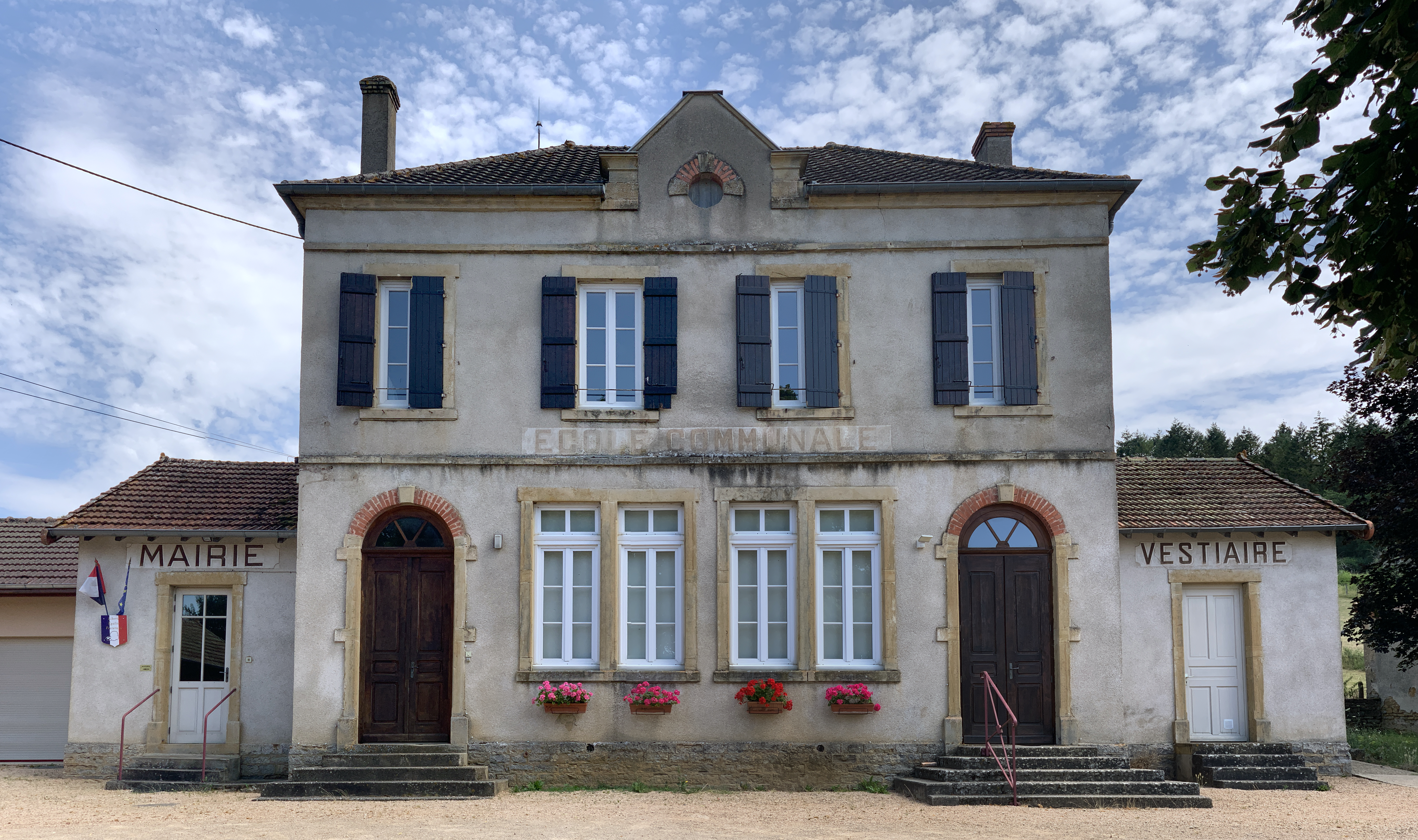 Mairie de Saint-Vincent-des-Prés, Saône-et-Loire.